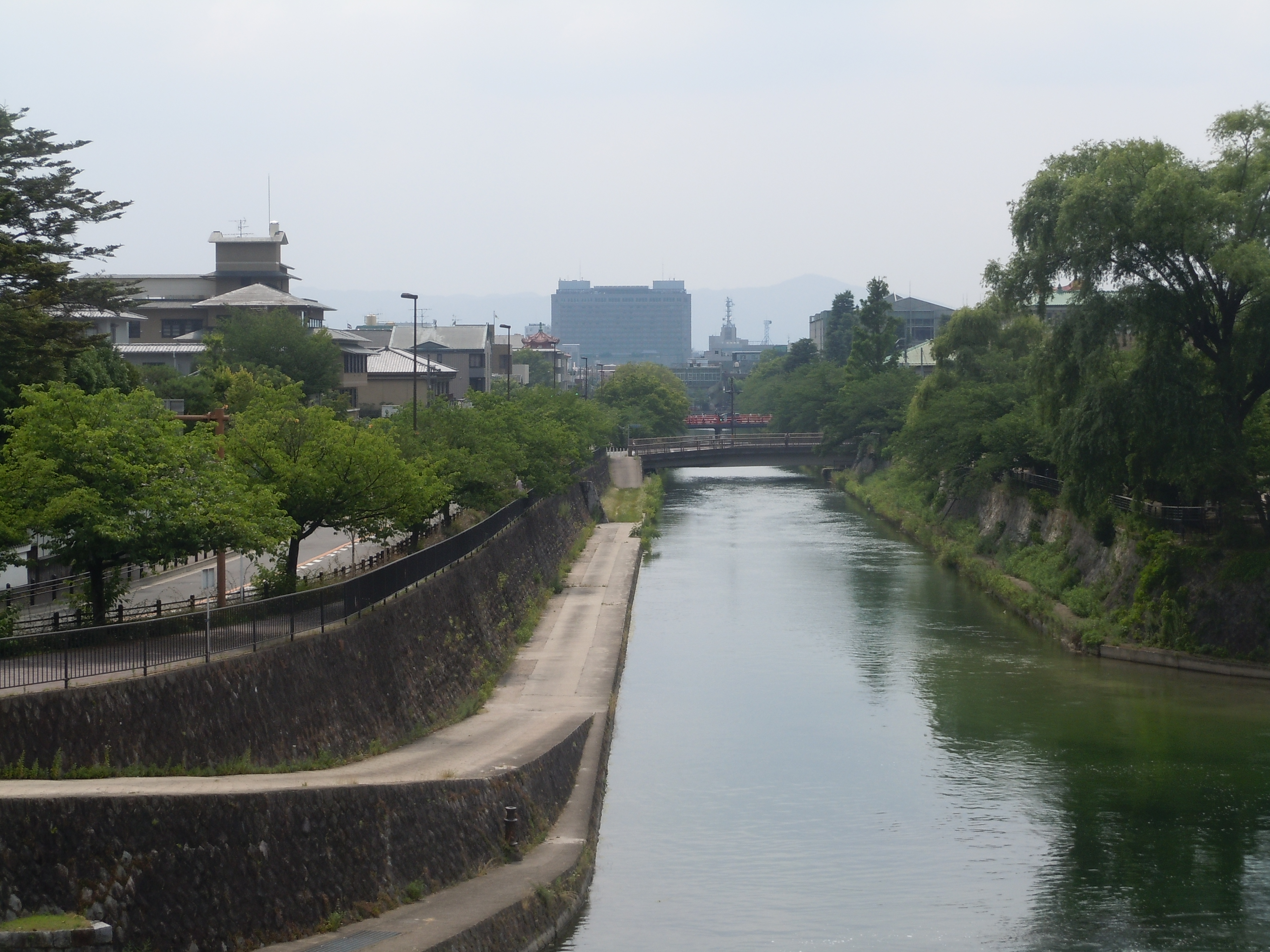 File:鴨東運河 (1895年).jpgと同位置の写真。2014年、琵琶湖疎水記念館2階より、投稿者自身が撮影。